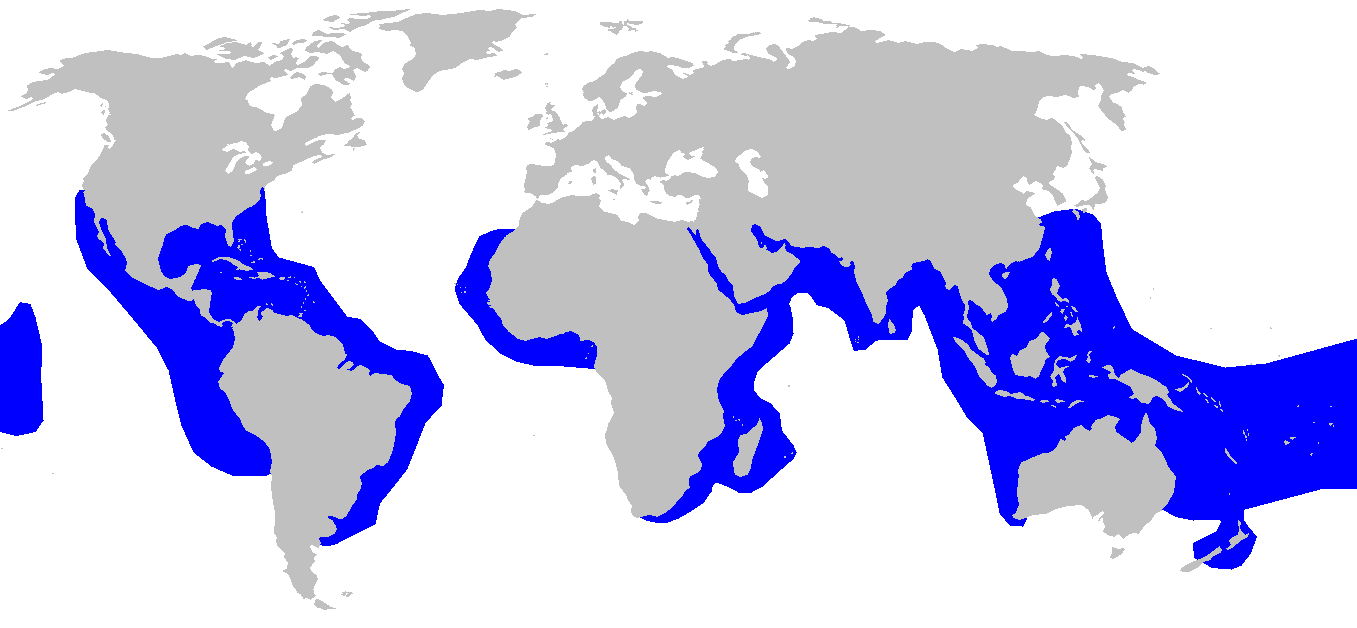 Distribution map for Galeocerdo cuvier